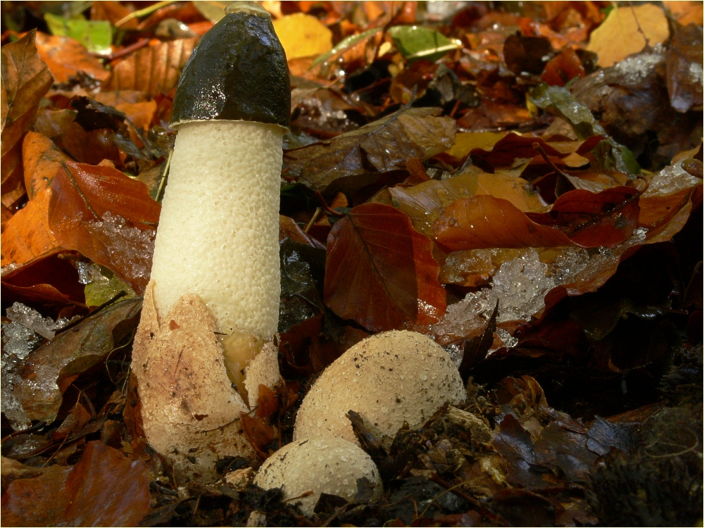 Stinkmorchel (Phallus impudicus) im ersten Schnee